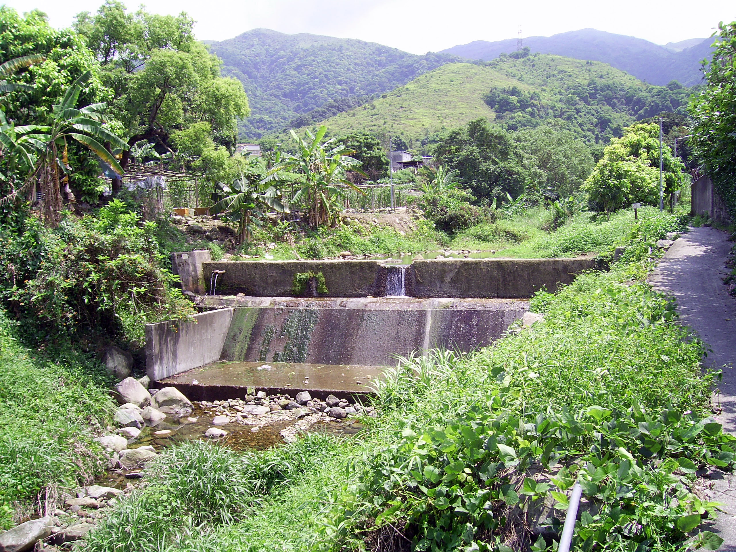 中文（香港）: 平朗附近一段林村河